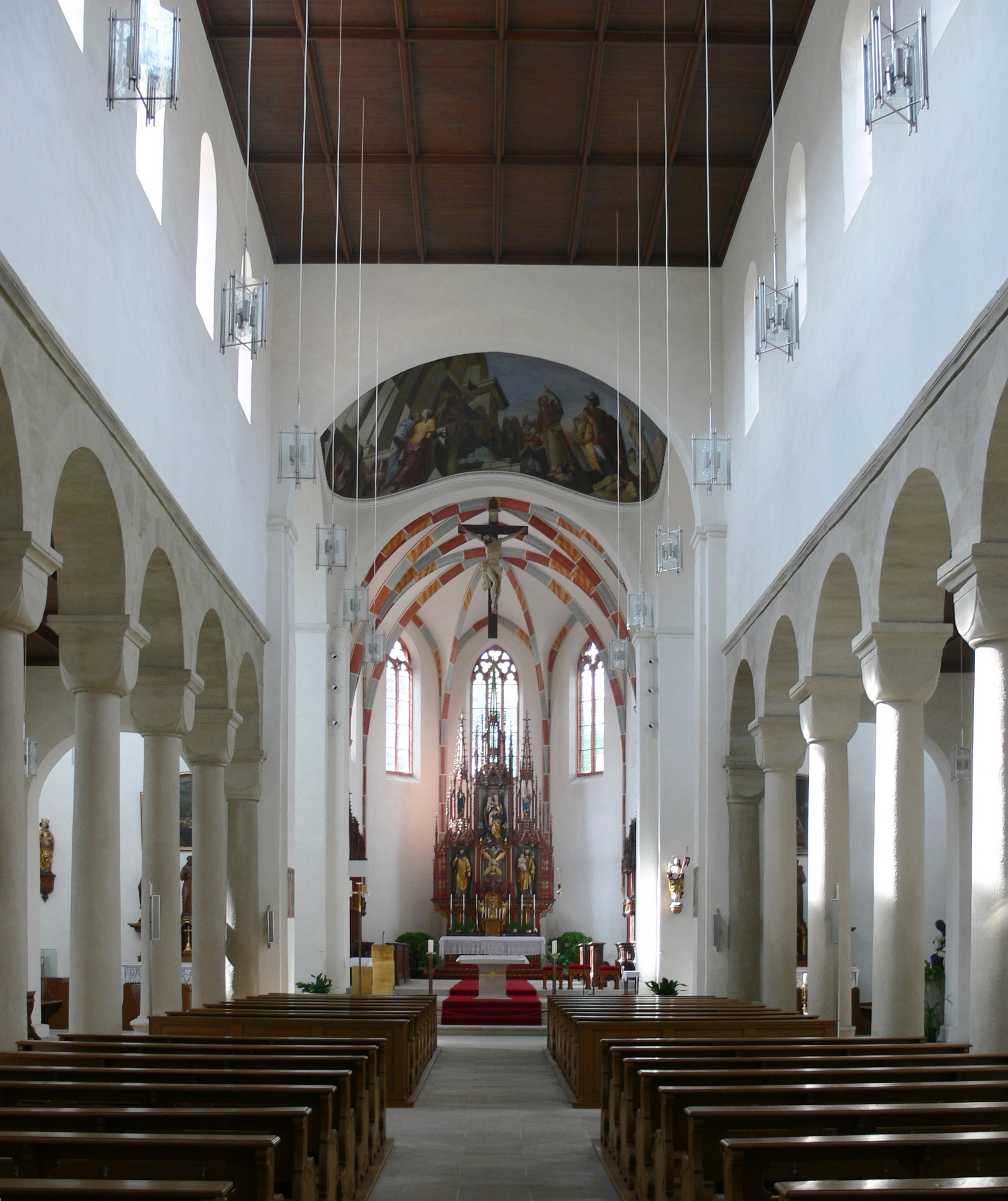 Bamberg, ehem. Stiftskirche St. Jakob